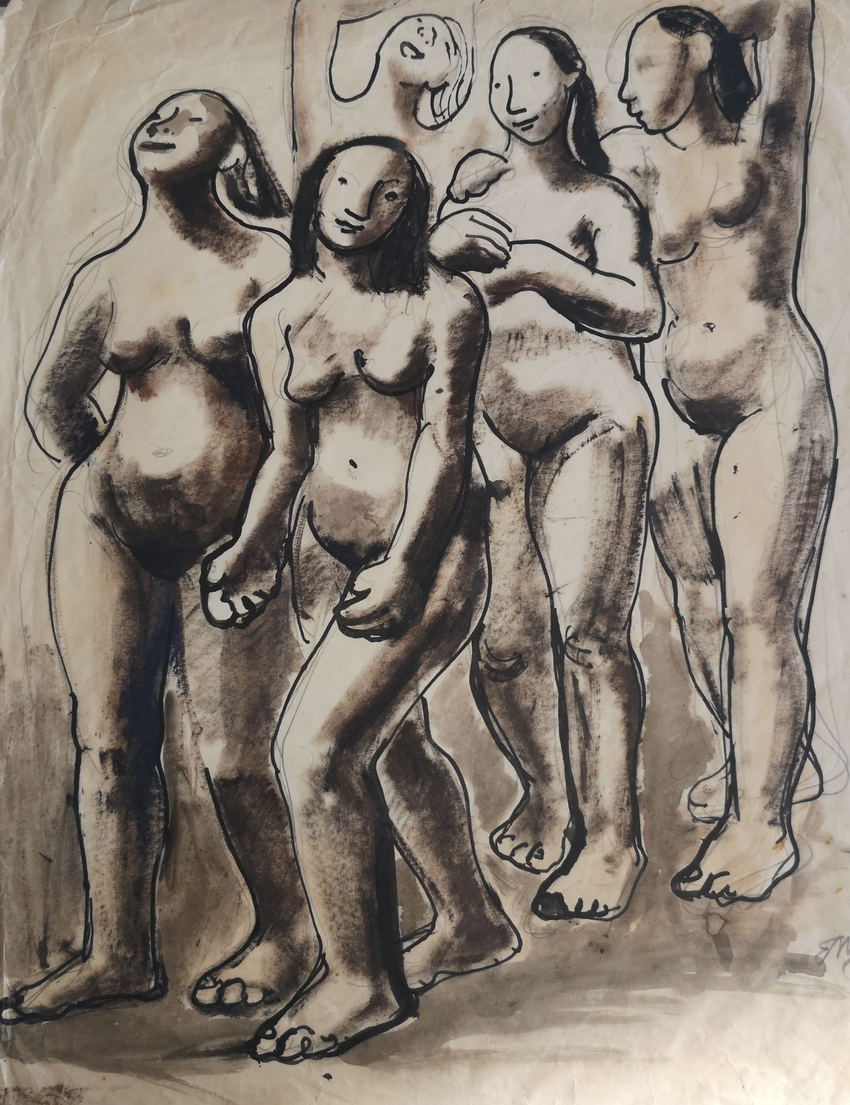 Tuschtegning af 5 nøgne kvinder der går